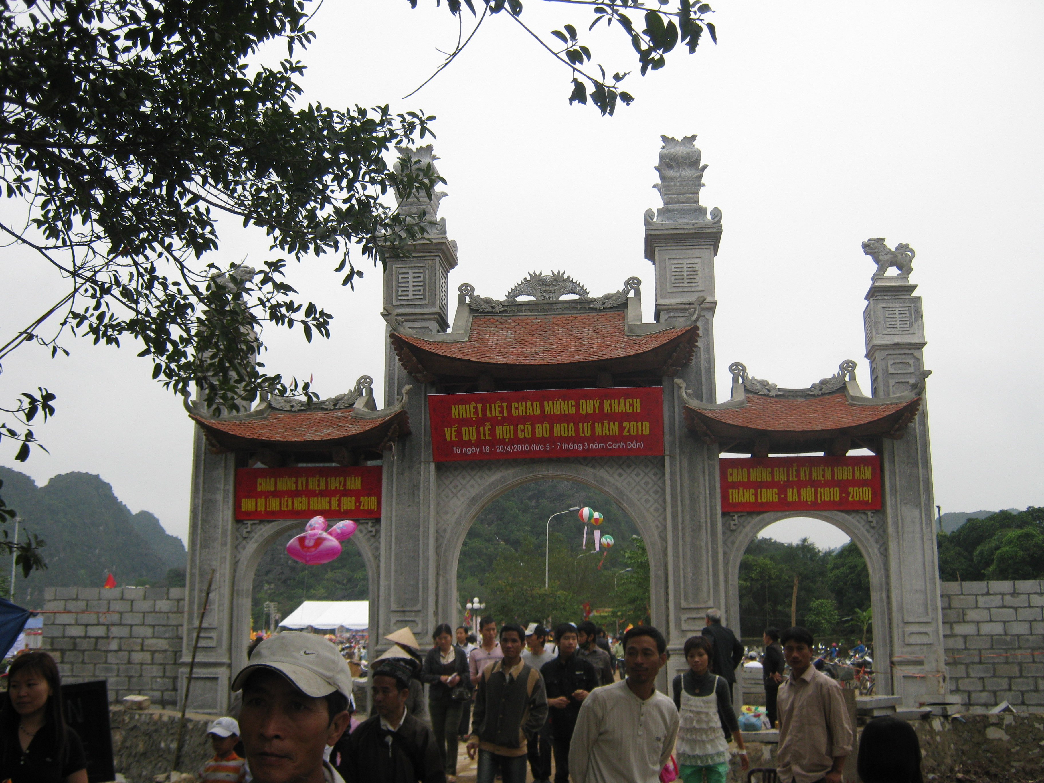 Cố đô Hoa Lư và lễ hội cố đô Hoa Lư 2010. Cửa Bắc đền vua Lê Đại Hành.